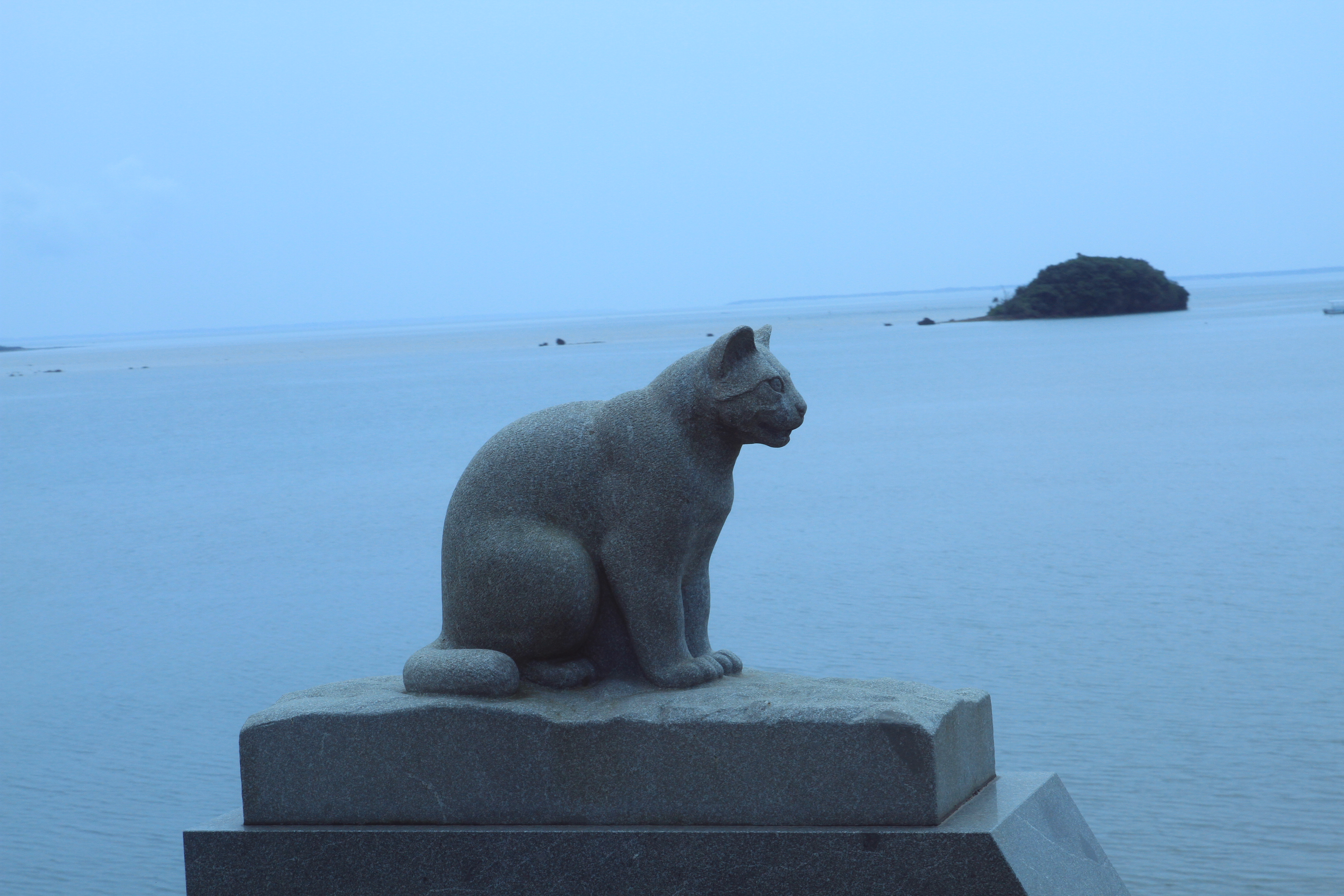 Une statue de Chat d'Iriomote sur l'île d'Iriomote, dans la zone des forêts de palétuviers.